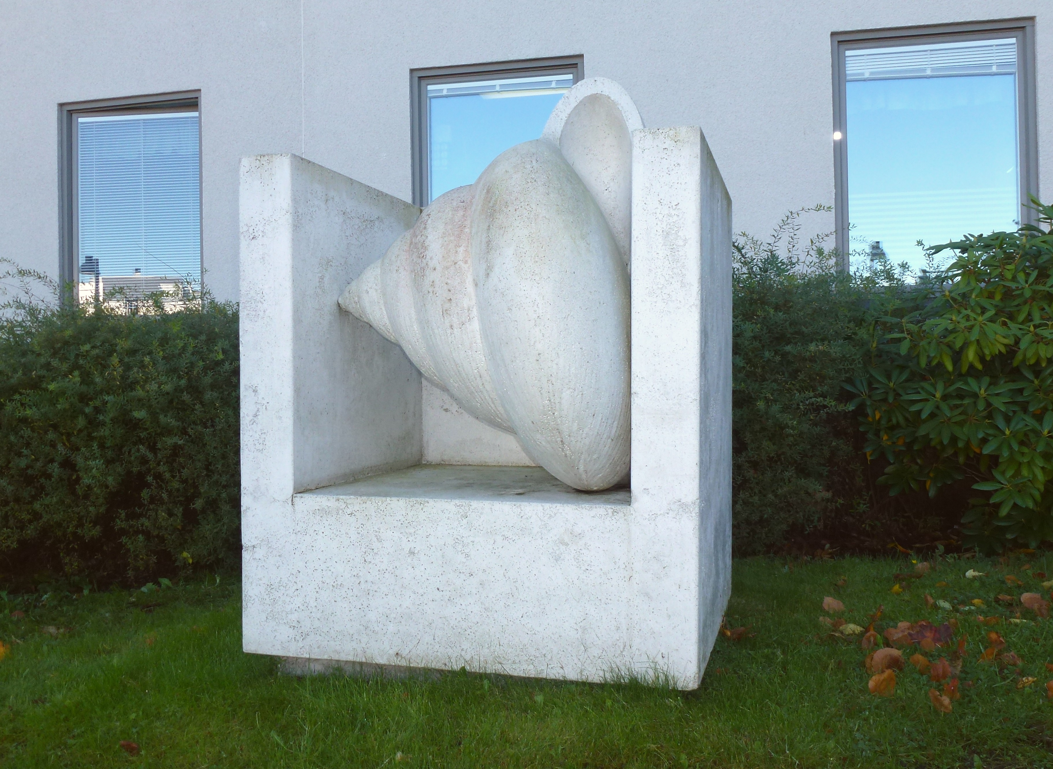 Skulpturen "Tills tidvattnet kommer" i marmorbetong av Henjasaj N Koda